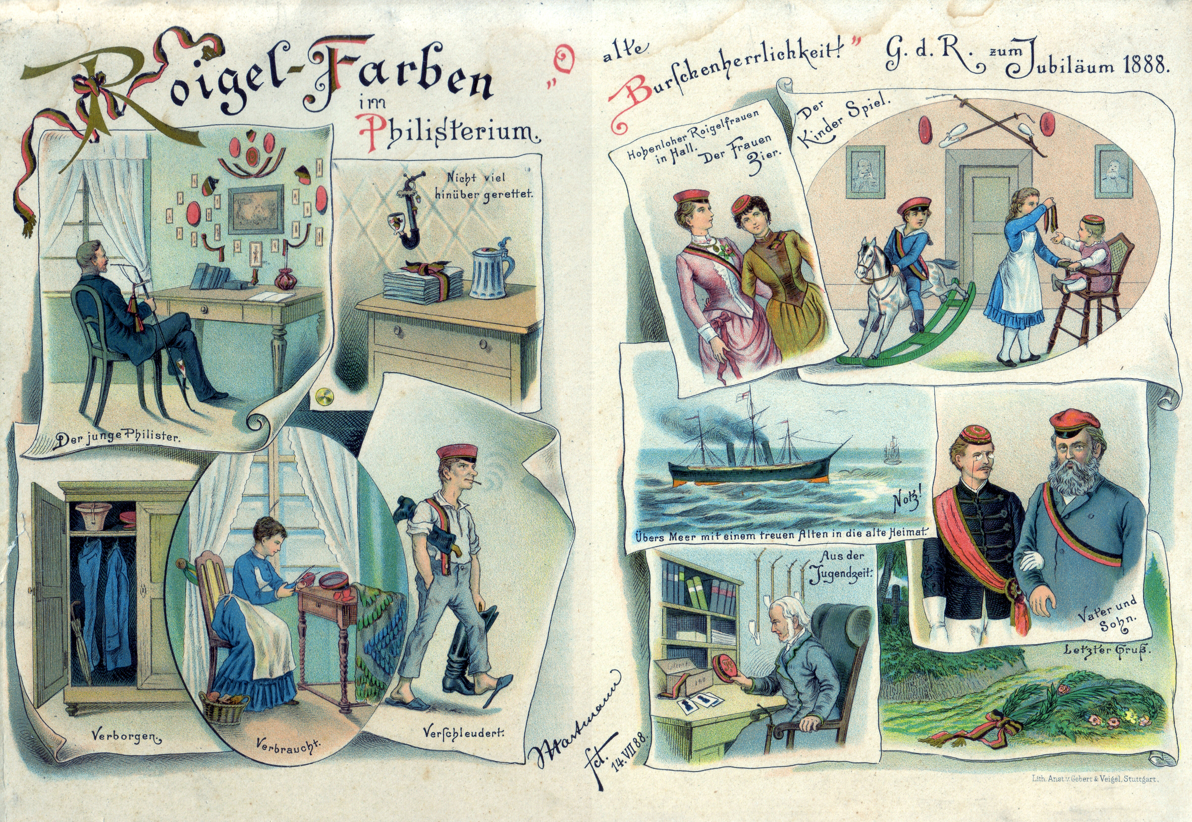 Kunstdruck einer Zeichnung von Reinhard Julius Hartmann "Die Roigelfarben im Philisterium". Entstanden anlässlich des 50. Stiftungsfestes der Studentenverbindung Tübinger Königsgesellschaft Roigel als "Zeichengazette".